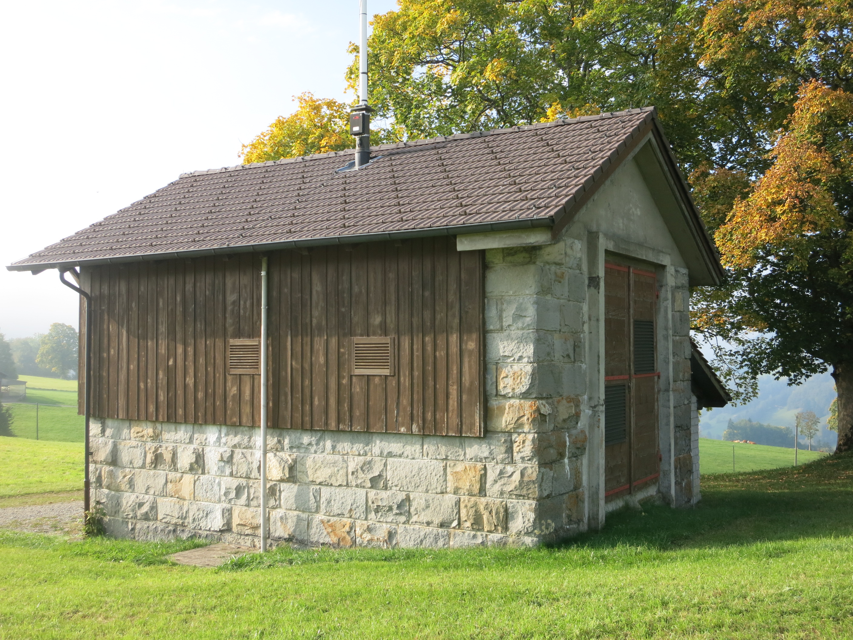 Artilleriewerk Aeschiried, Aeschi bei Spiez BE, Schweiz